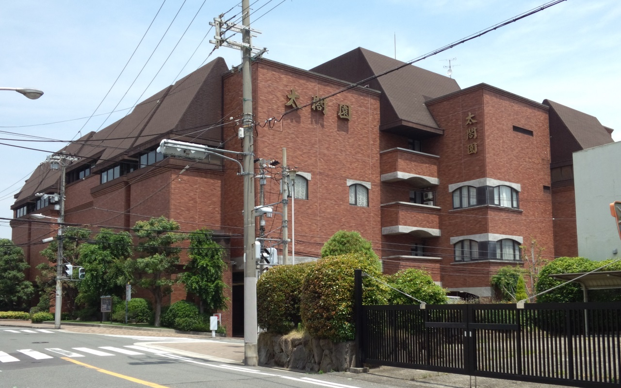 藤田観光グループ・太閤園